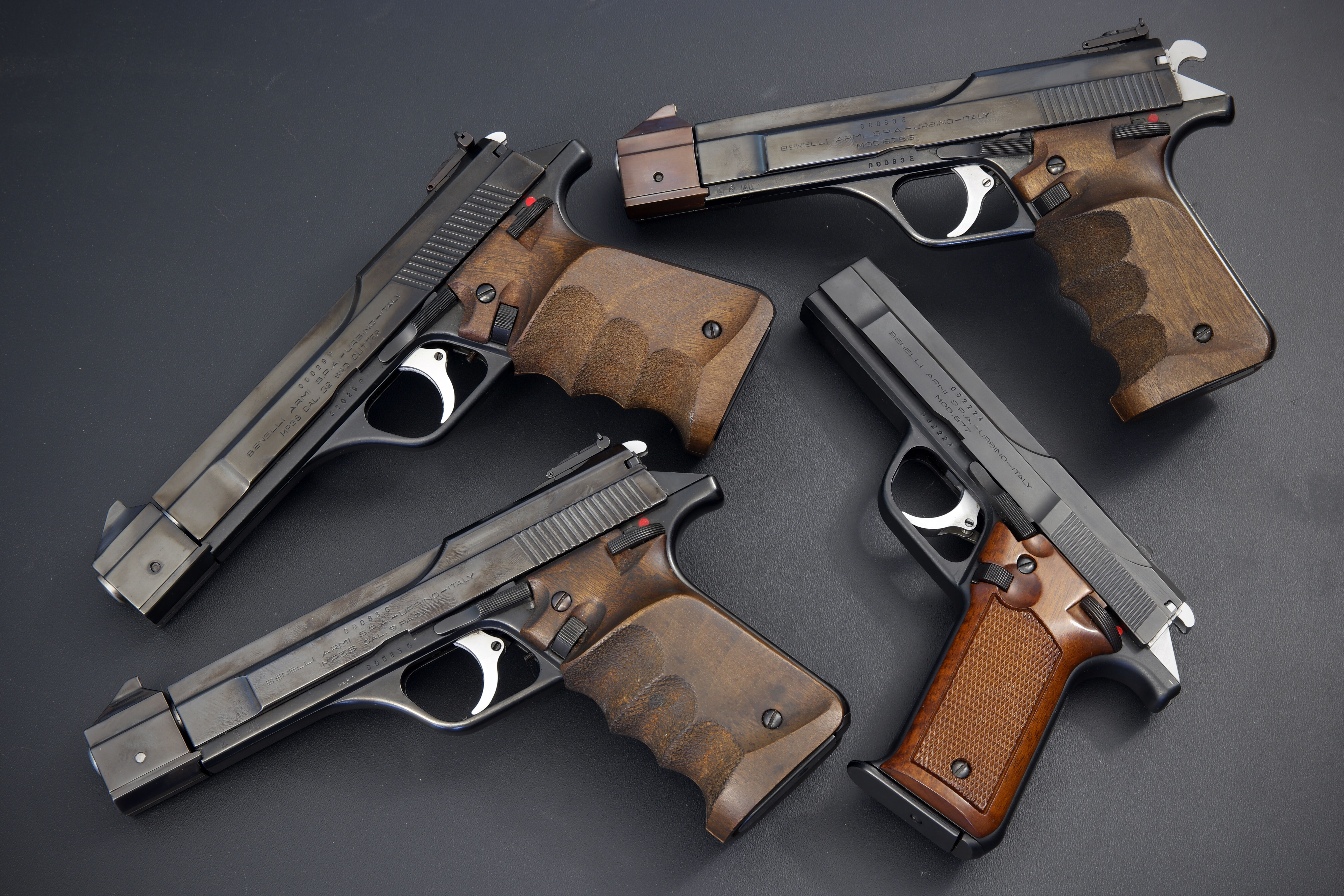 B76 Sport 9mm, MP3S 9mm, MP3S .32 Wadcutter, B77 32acp